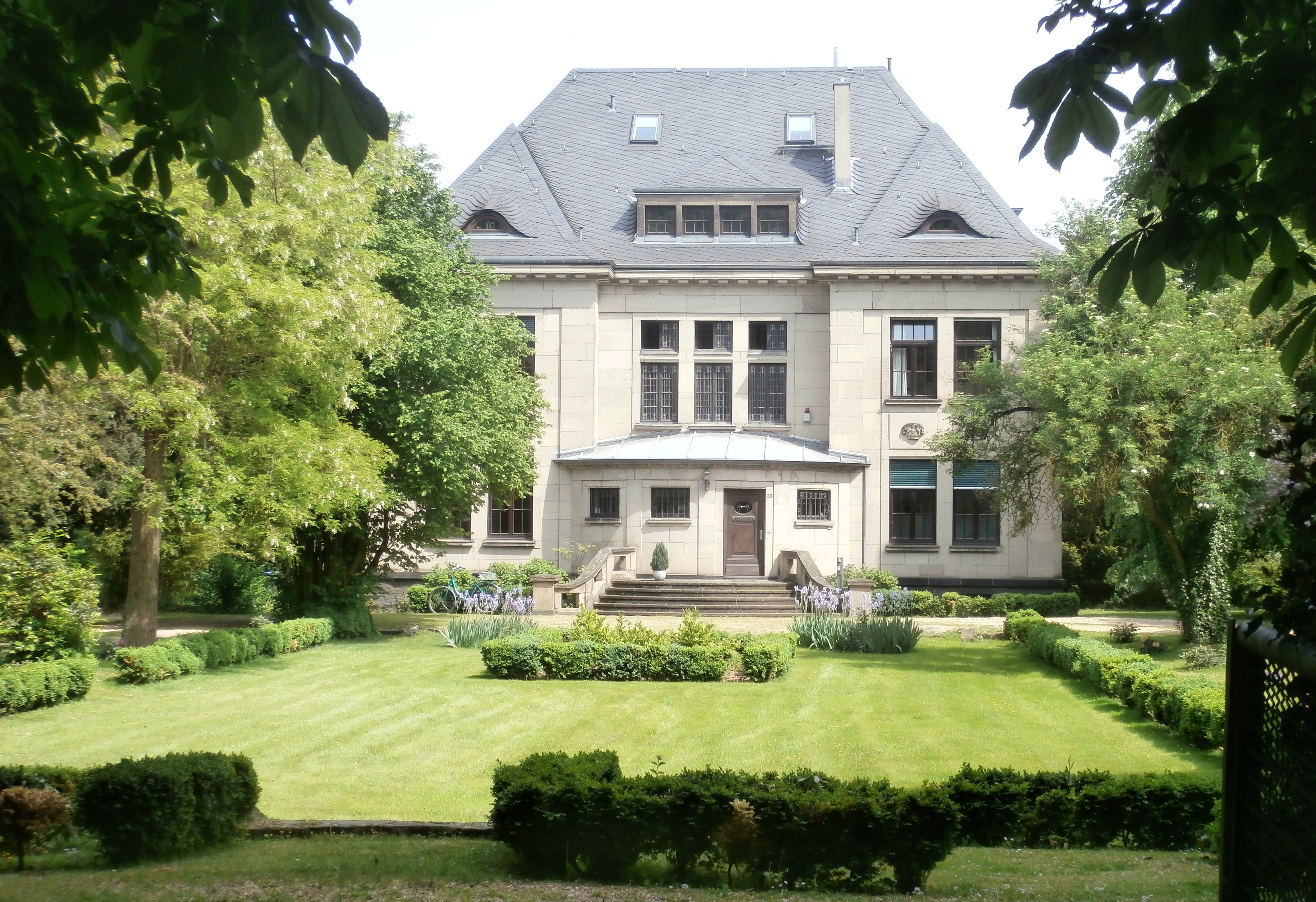 Denkmalgeschützte Villa, Hauptstraße 26, Oberwinter, Remagen